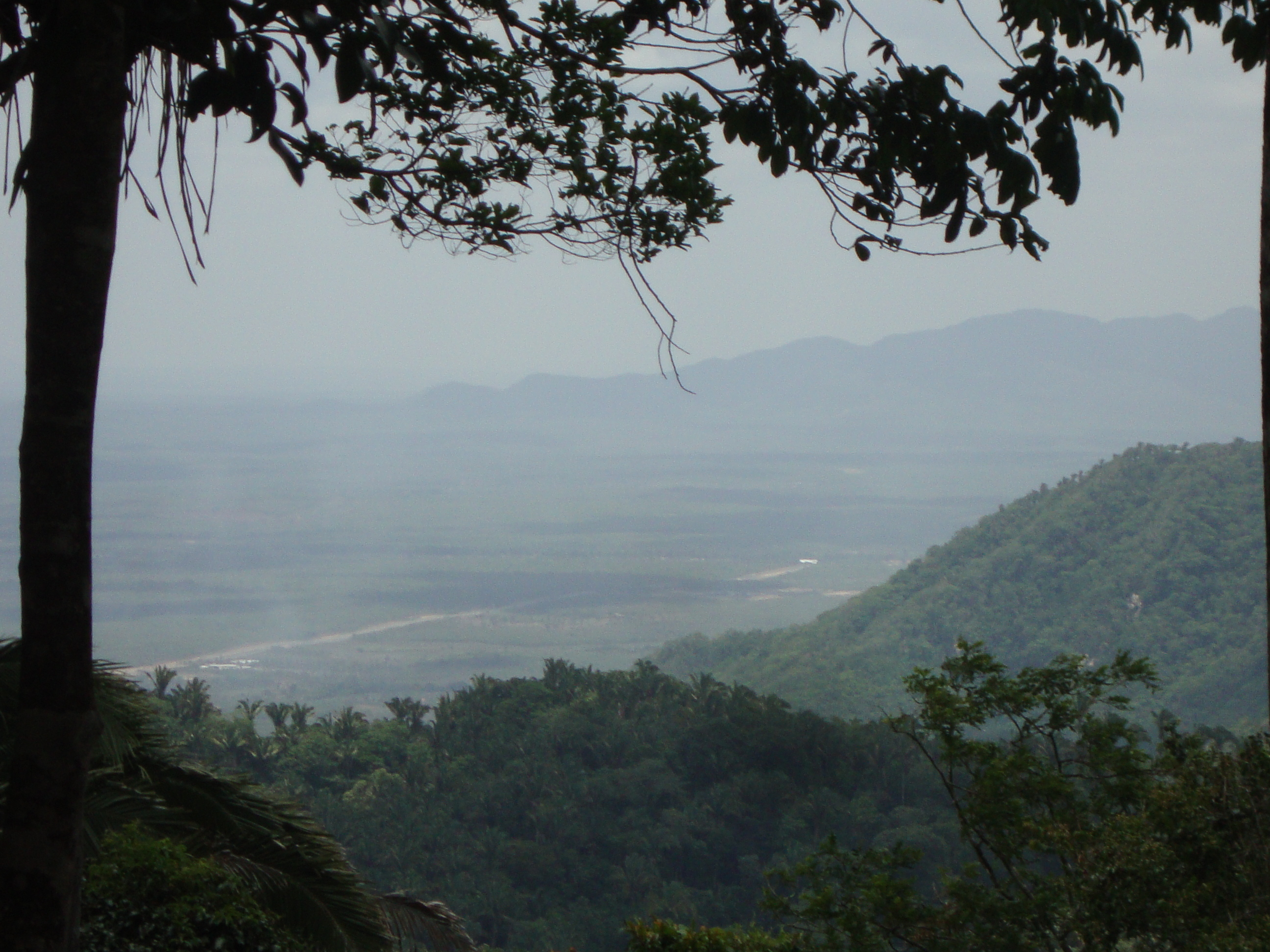 Paisagem vista de cima da Serra da Aratanha, Pacatuba - CE, Brasil.